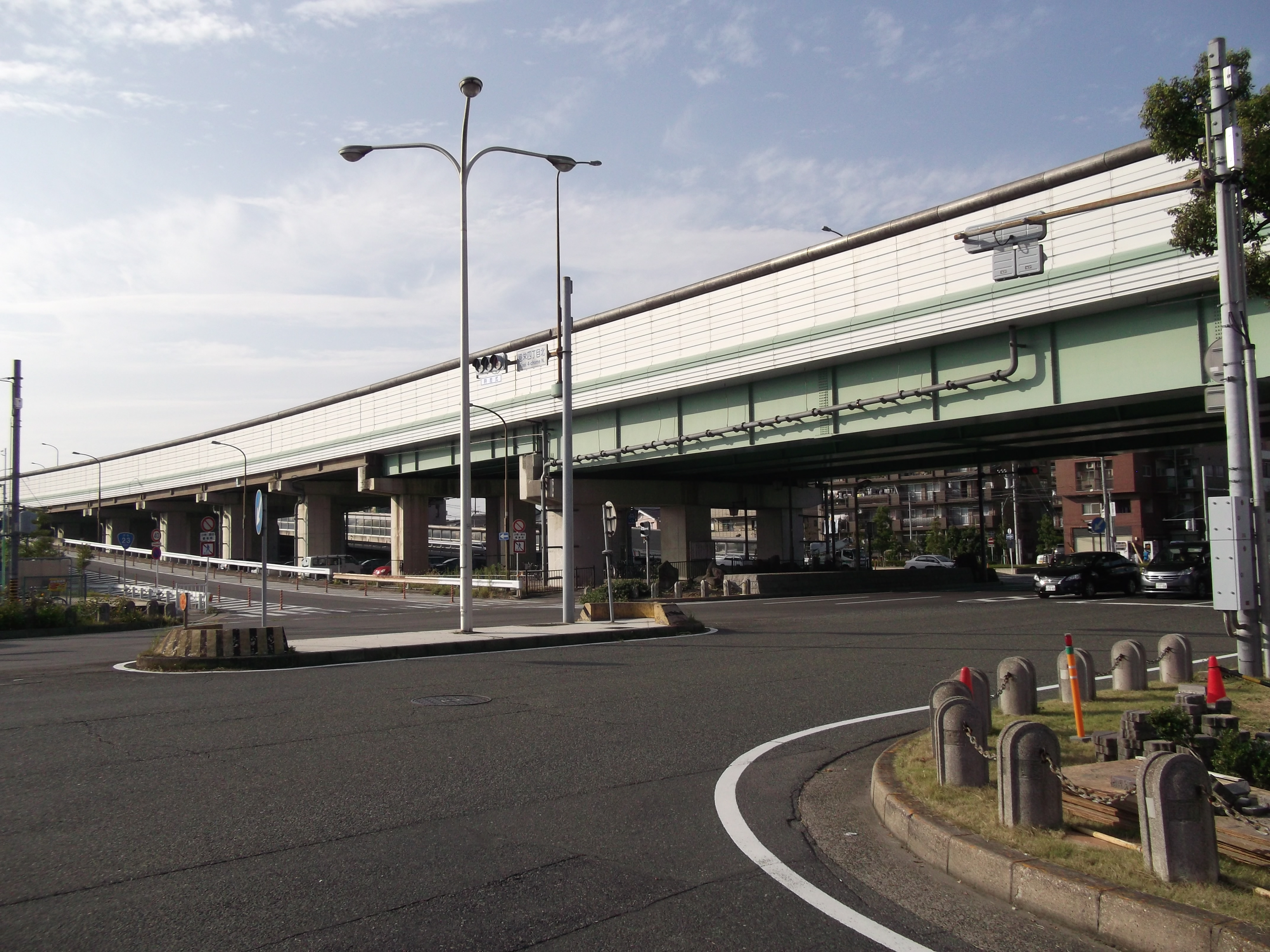 名古屋市港区の国道23号（名四国道）築地口インターチェンジを南東から撮影